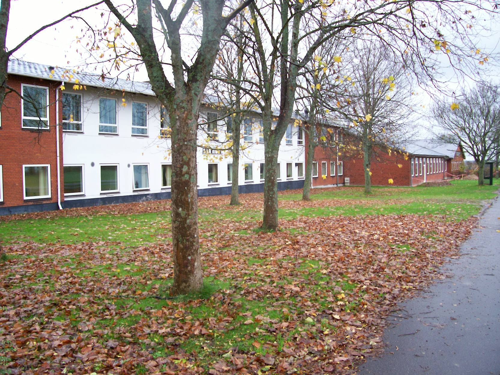 Mosaik med Højelse Skole, som ses i skolegården på Højelse Skole.